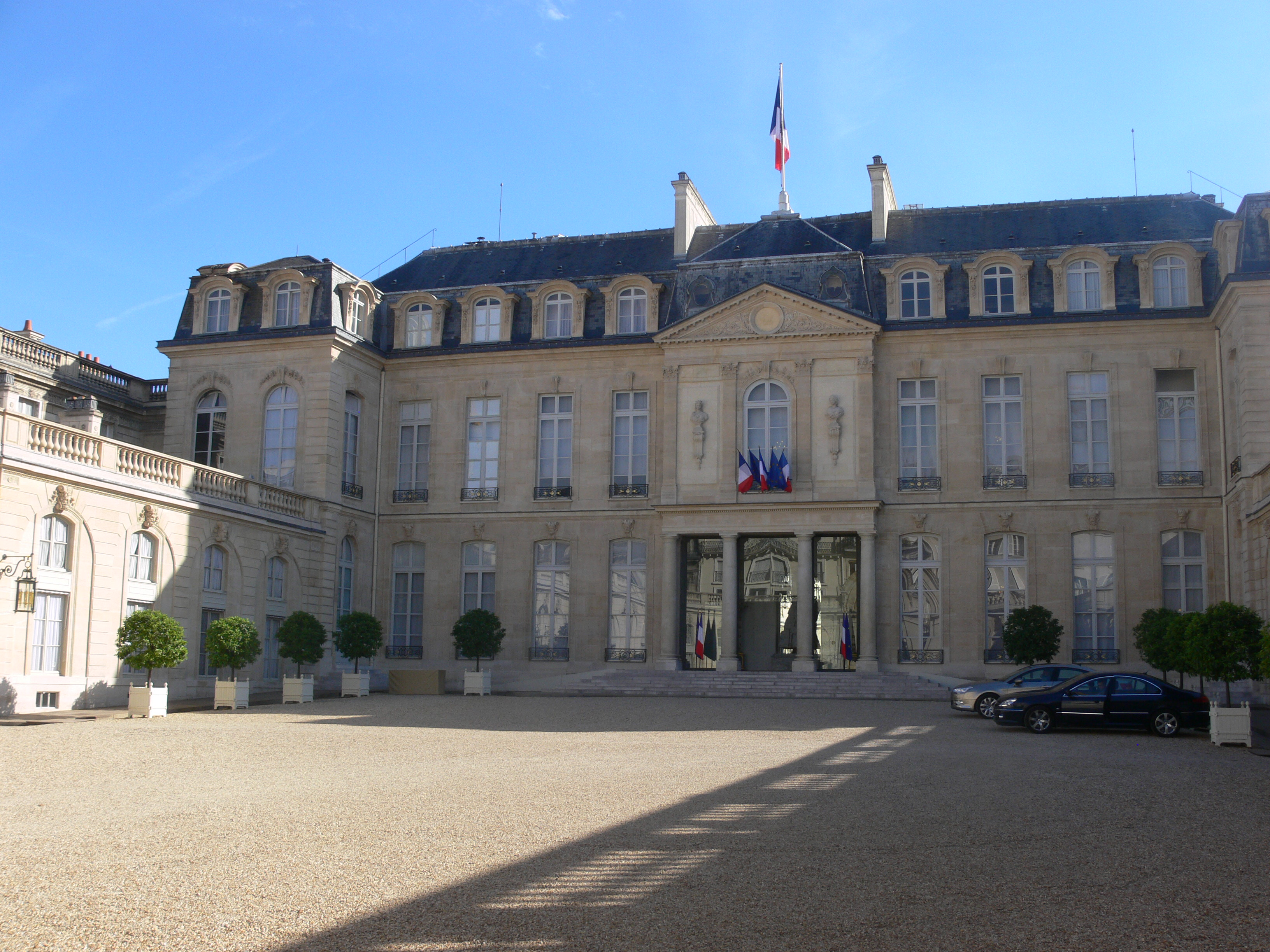 Paris - palais de l'Élysée - cour